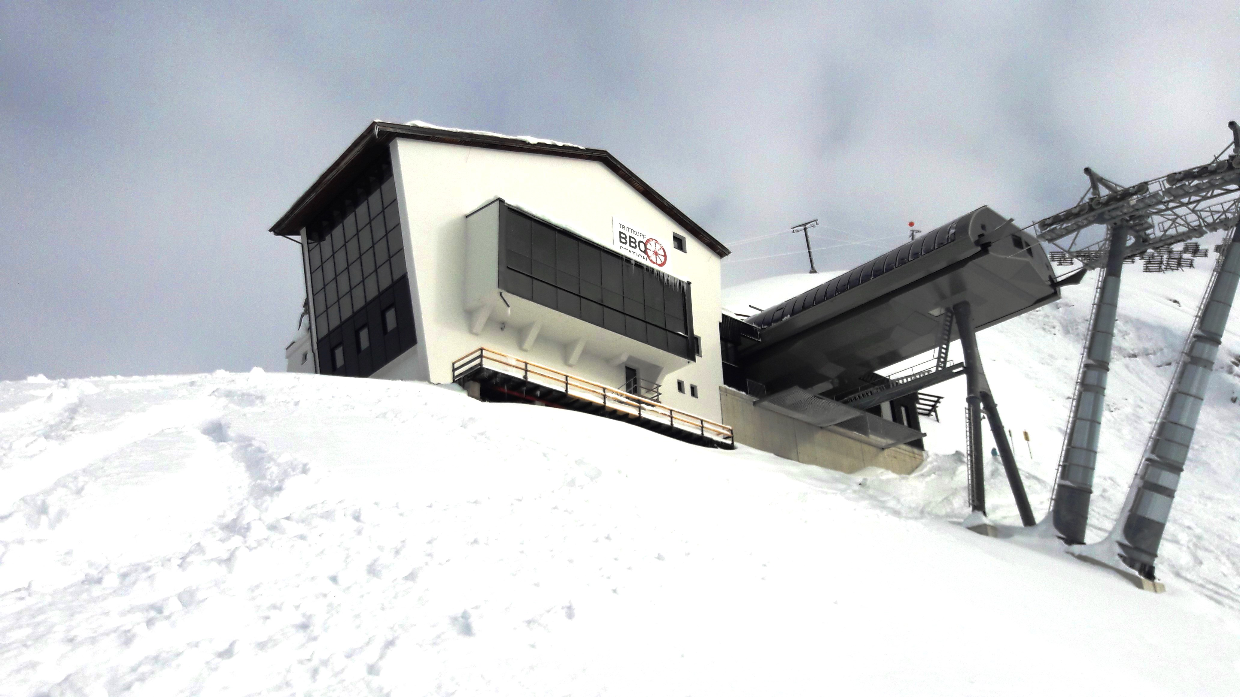 Die ehemalige Bergstation ist heute ein kleines Restaurant